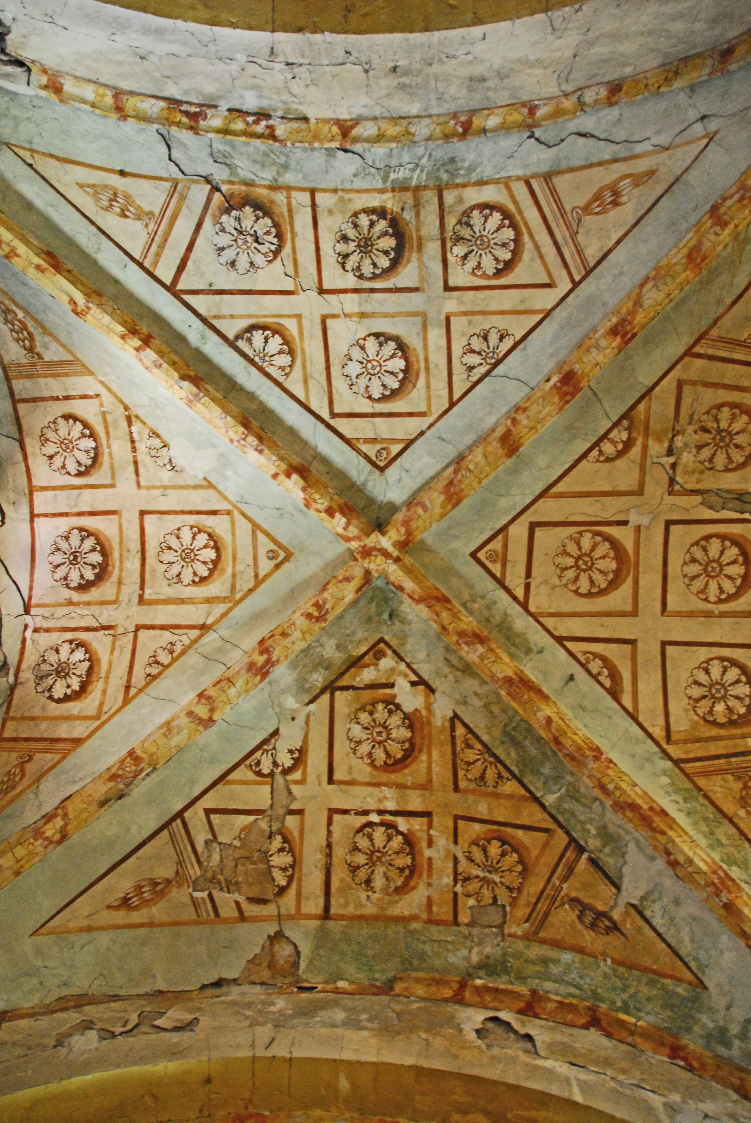 N-D et St-Christophe de St-Christol, Hauptschiff, kreuzrippengewölbe, Joch 1